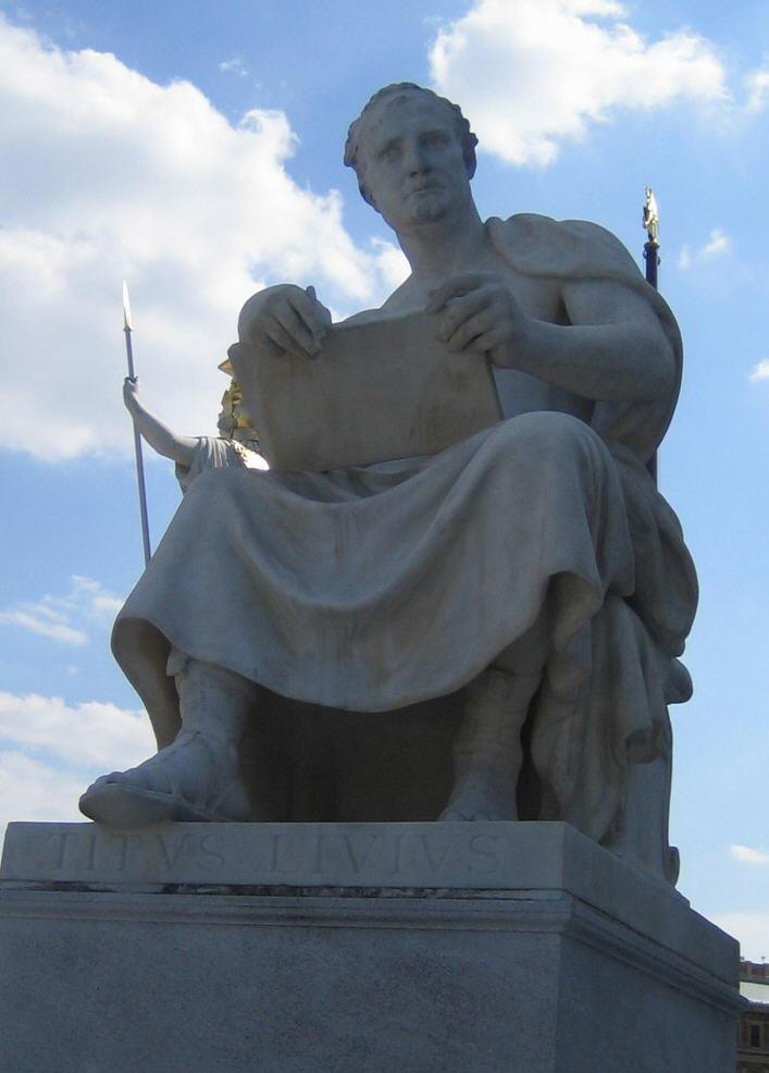 Livius Statue auf der rechten Rampe des Parlaments: römische Seite, 2007